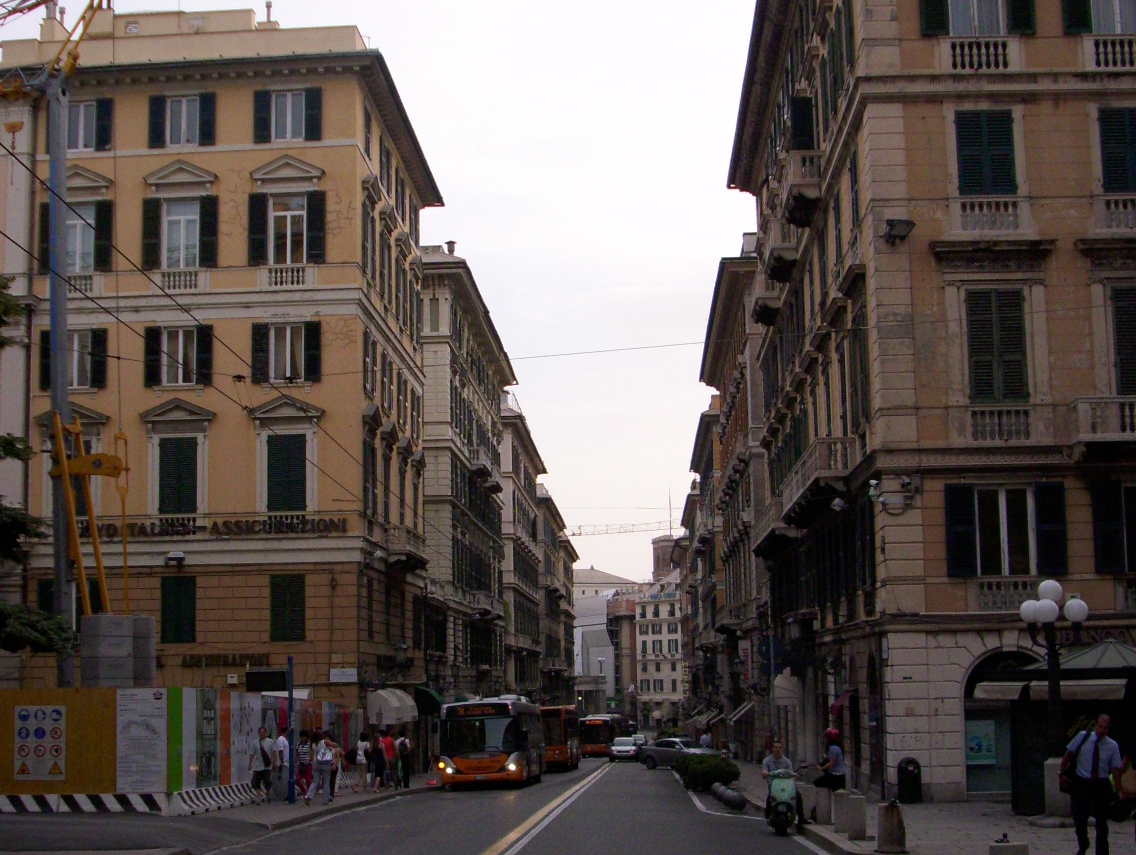 Via Roma a Genova. Sulla sinistra gli scavi per il prolungamento della metropolitana tra De Ferrari e Brignole.